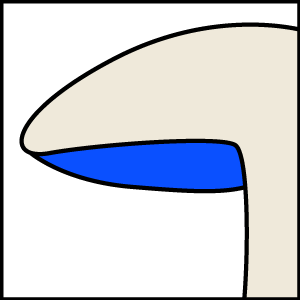 icono para la plantilla Micomorfobox